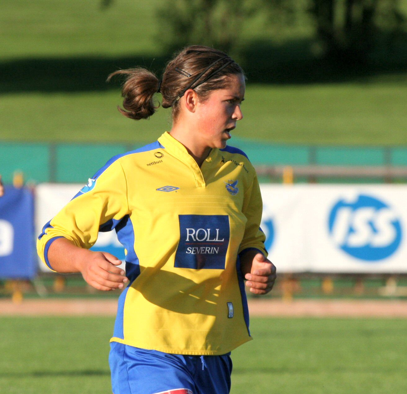 Fotballspilleren Oda Fugelsnes